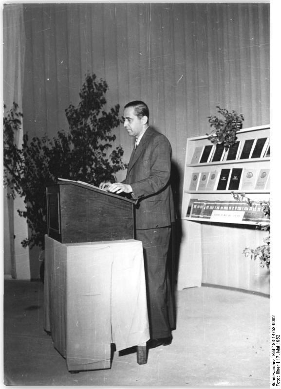 Zentralbild-Illner 17.5.1952 "Woche des Buches" in Leipzig. In der Ausstellung "das fortschrittliche Buch - ein Helfer im Friedenskampf" lasen Leipziger Schriftsteller und Dichter aus ihren Werken. UBz: Georg Maurer